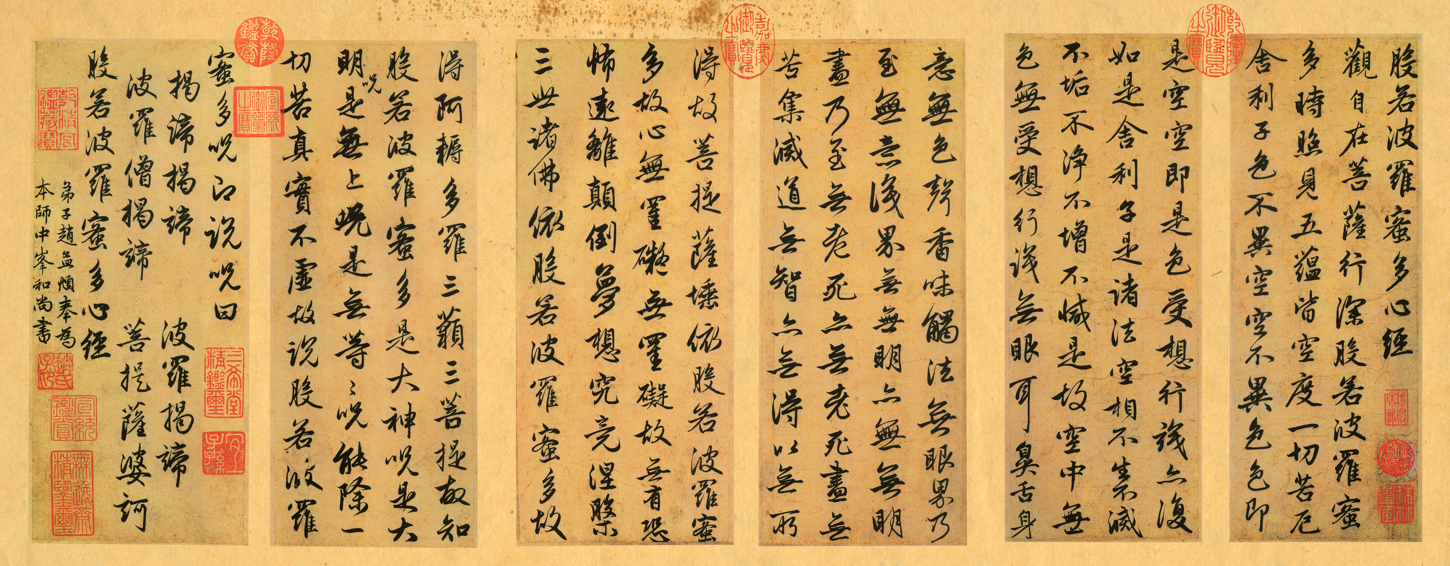 趙孟頫書寫的《般若波羅蜜多心經》。